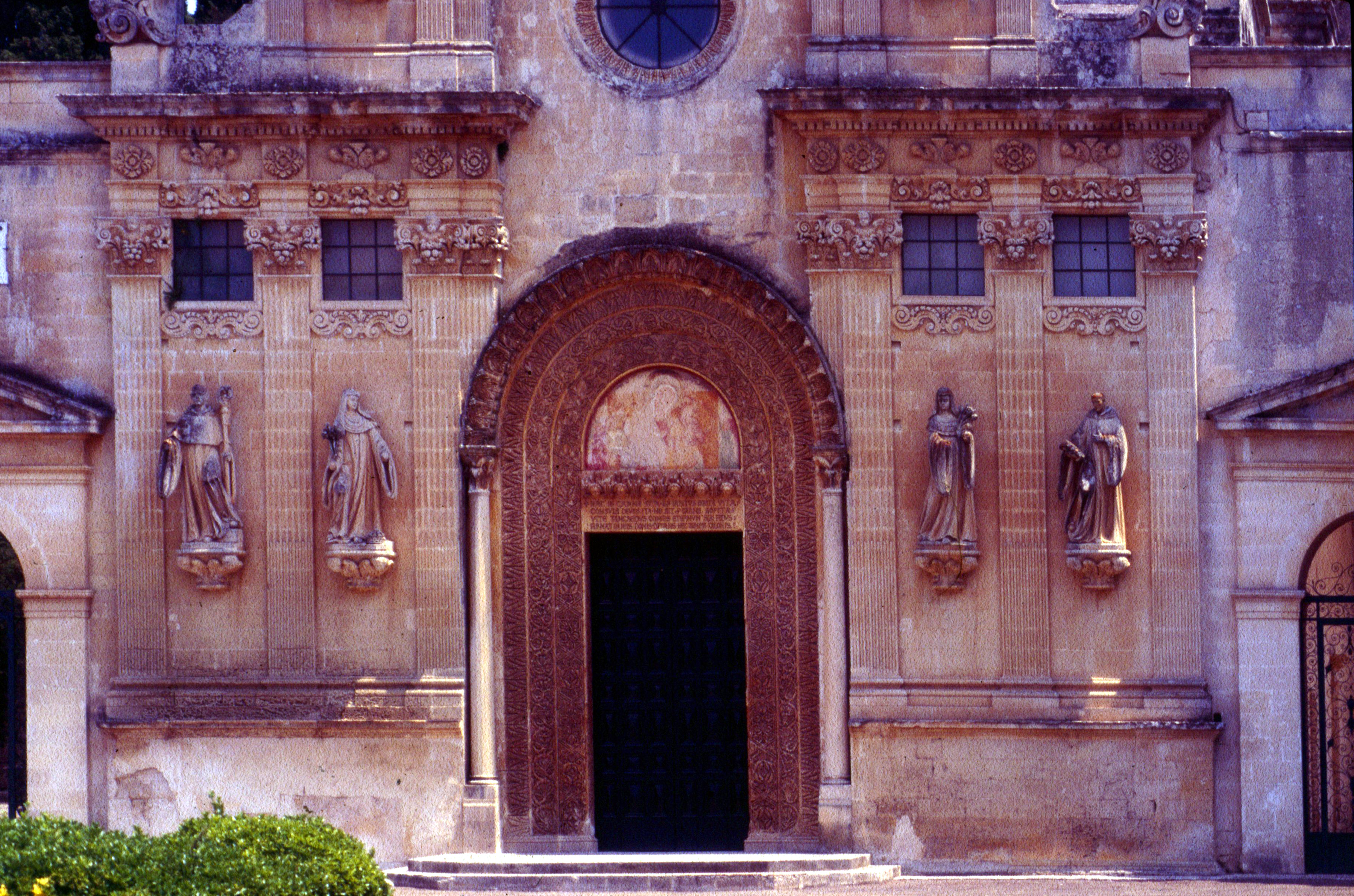 Santi Niccolò e Cataldo (Lecce)